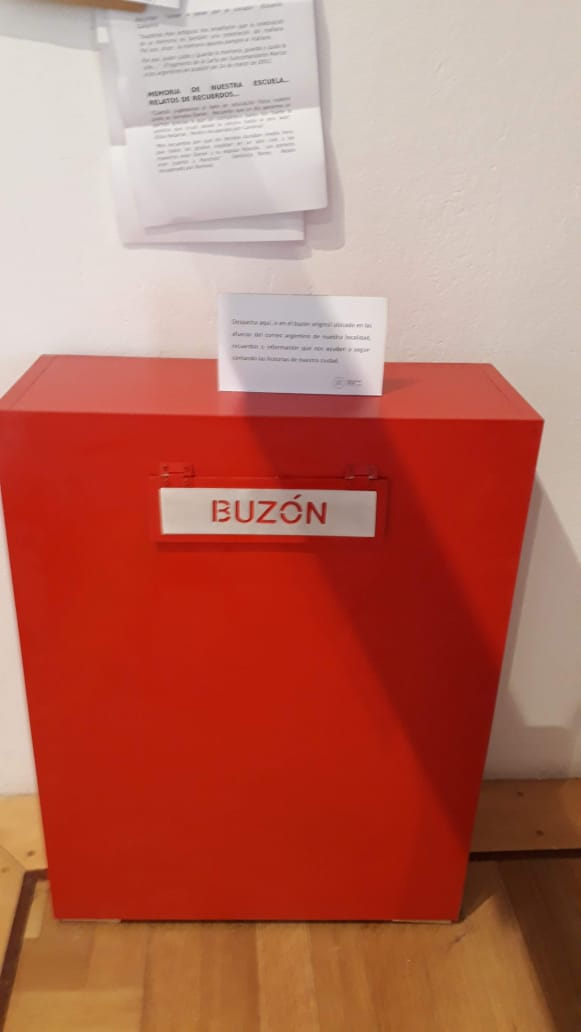 El buzón contiene aún carta de los ciudadanos